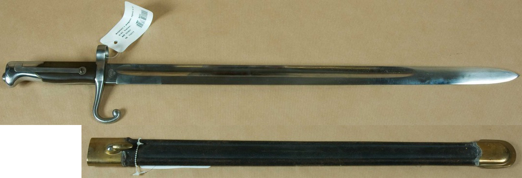 Bajonet in nožnica italijanske puške Vetterli-Vitali M1870-87.